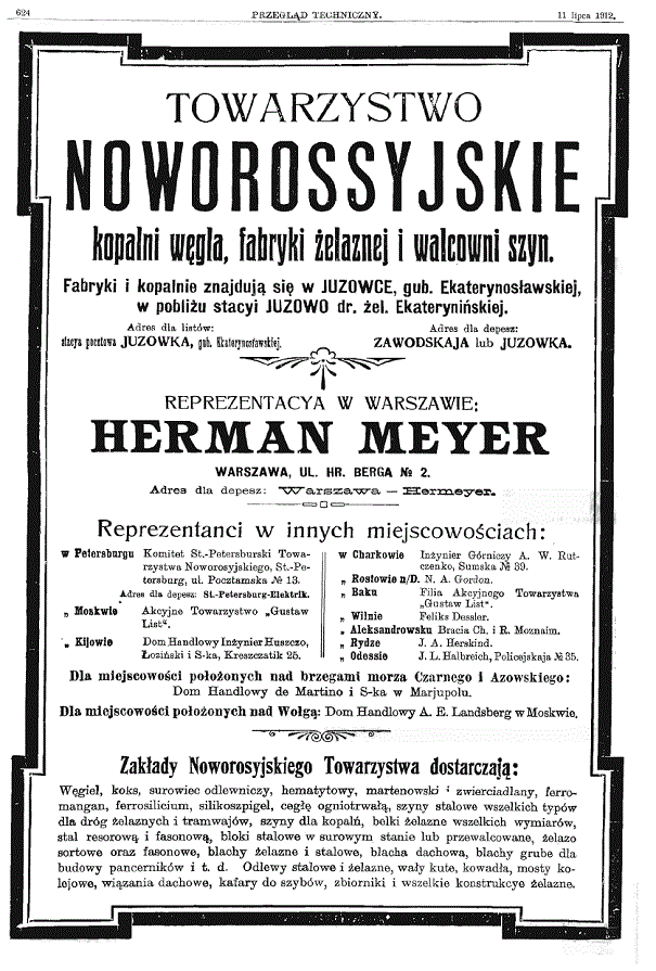 Materiał reklamowy Towarzystwa Noworozyjskiego